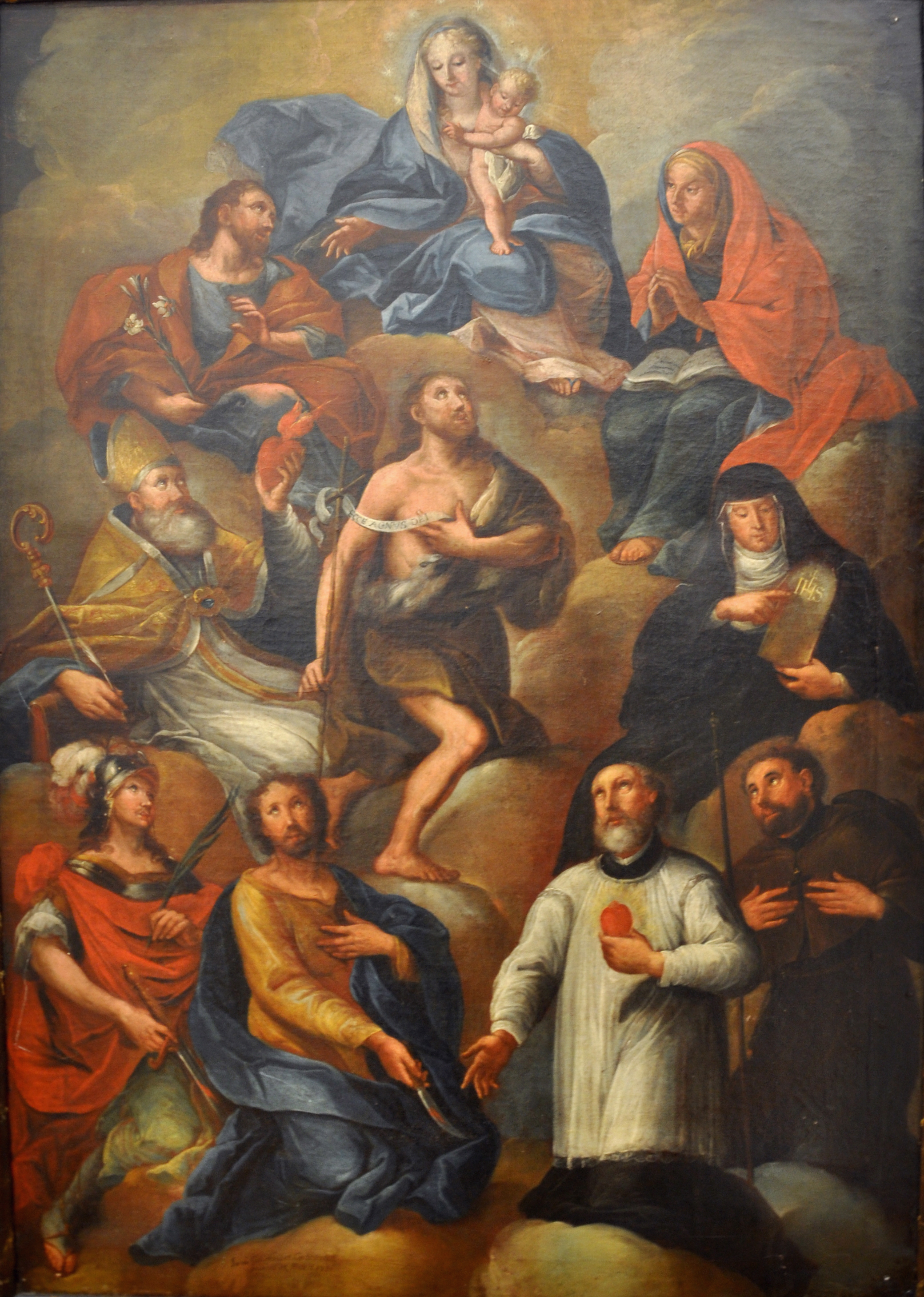 Muttergottes mit neun Heiligen (B 88), ausgestellt in der Kreisgalerie Meßkirch